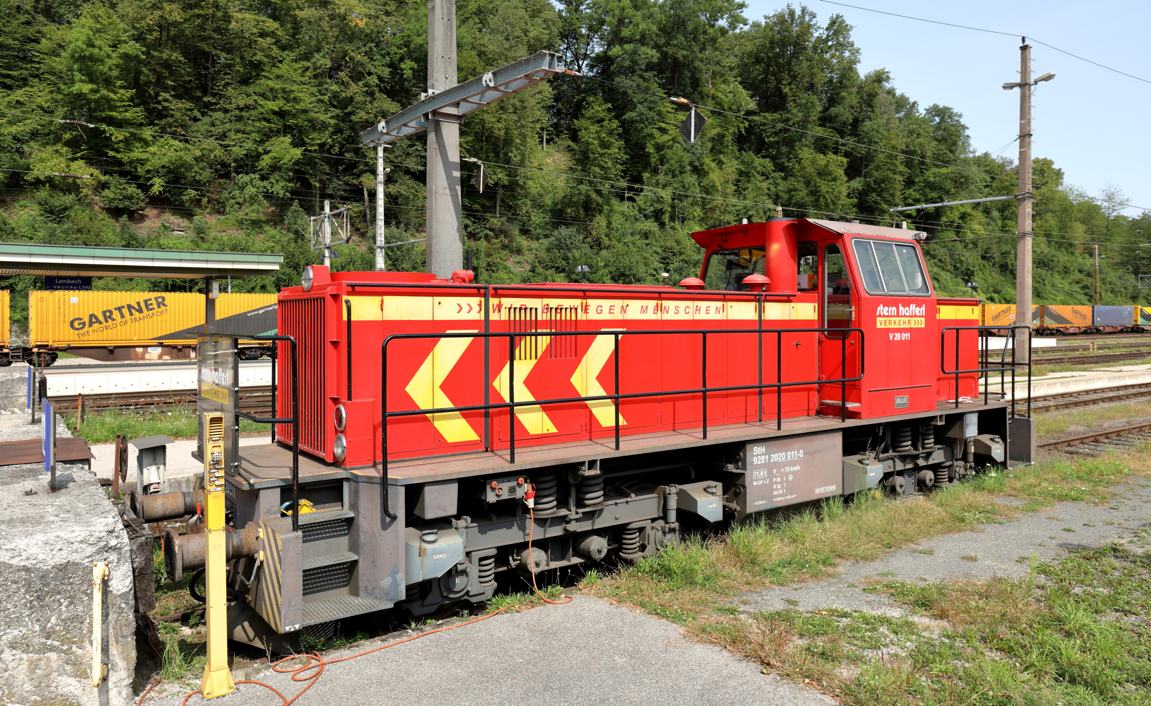 Die Diesellokomotive Nr. V 20 011 der Stern & Hafferl Verkehrsgesellschaft am Bahnhof der oberösterreichischen Marktgemeinde Lambach. Die Lokomotive mit der Fabriksnr. 1000800, Typ MaK G 1203 BB, wurde 1982 von der Firma Maschinenbau Kiel (MAG) gebaut. Die Auslieferung der Lokomotive erfolgte an die TAG - Tegernsee-Bahn Aktiengesellschaft und seit 1999 ist sie bei Stern & Hafferl in Verwendung.